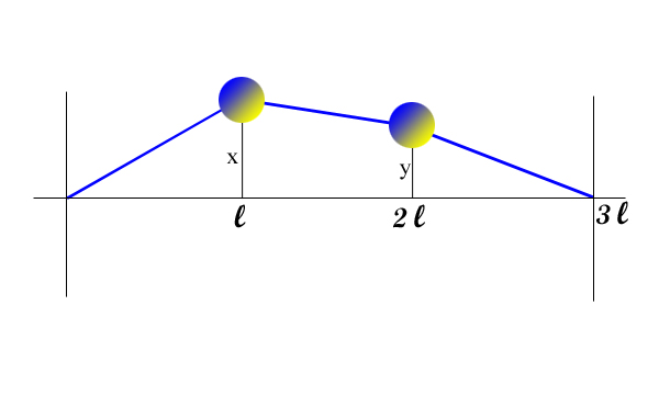 Illustration d'un pendule particulier imaginé par D'Alembert pour modéliser une corde vibrante